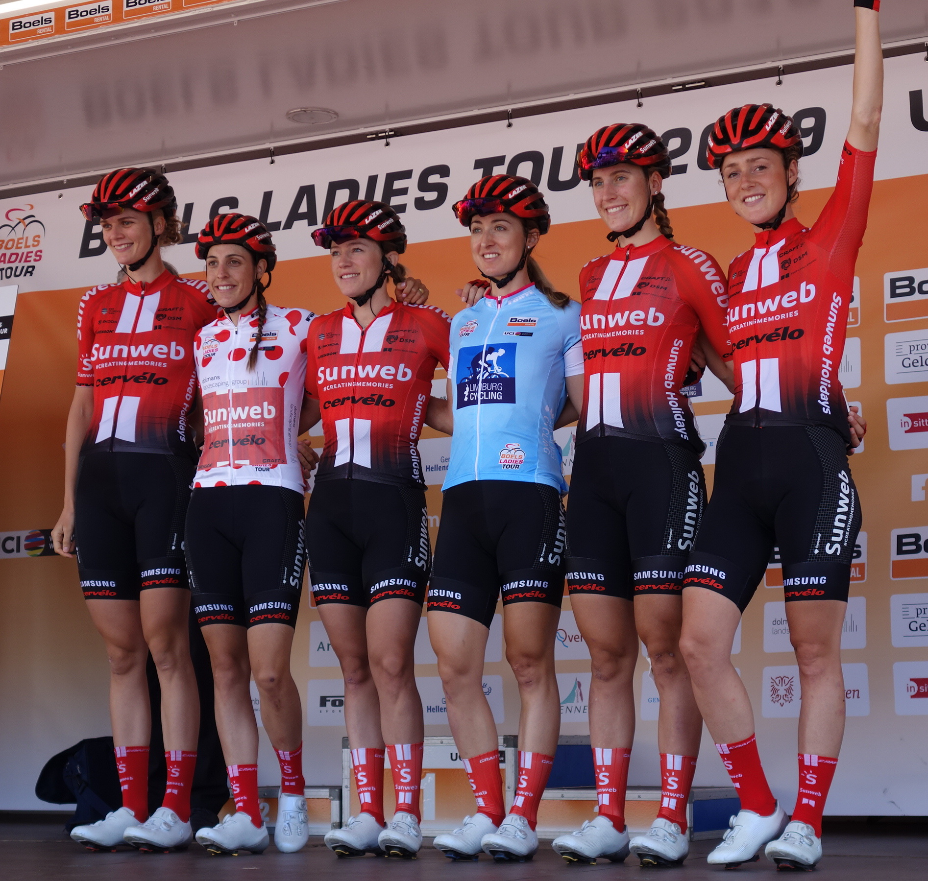 Team Sunweb bij de start van de eerste etappe van Stramproy naar Weert in de Boels Ladies Tour 2019